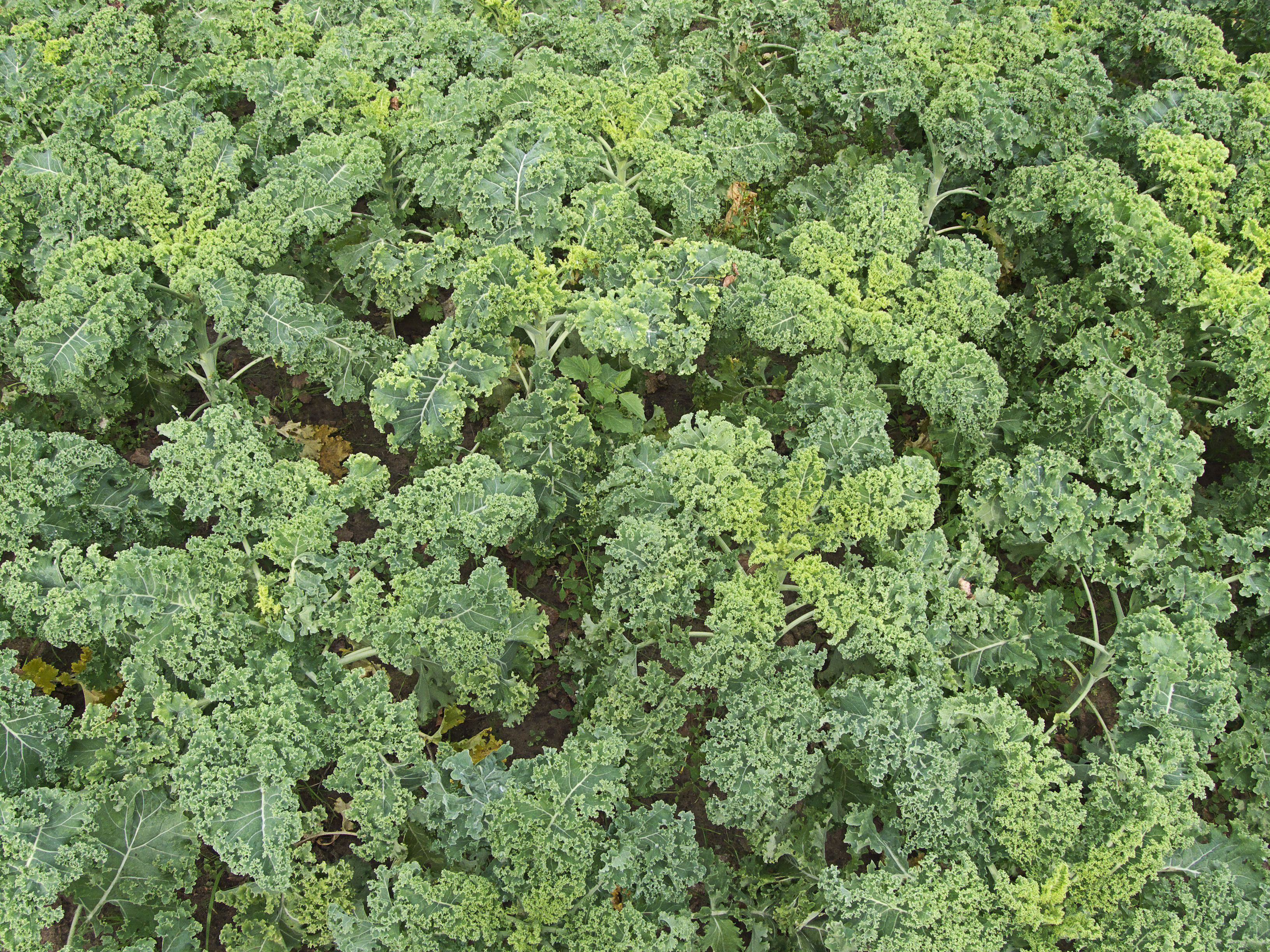 Brassica oleracea convar. acephala var. laciniata 'Westlandse winter', boerenkool 'Westlandse winter'